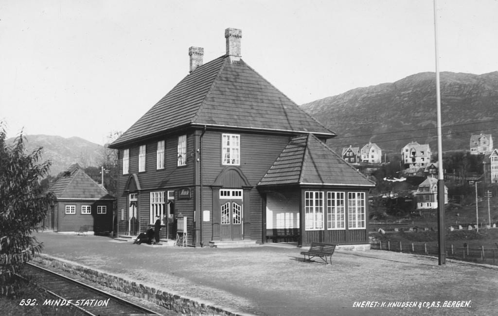 Minde stasjon på Vossebanen. Foto: K. Knudsen & Co. (Knud Knudsens firma), fra billedbasen Marcus.